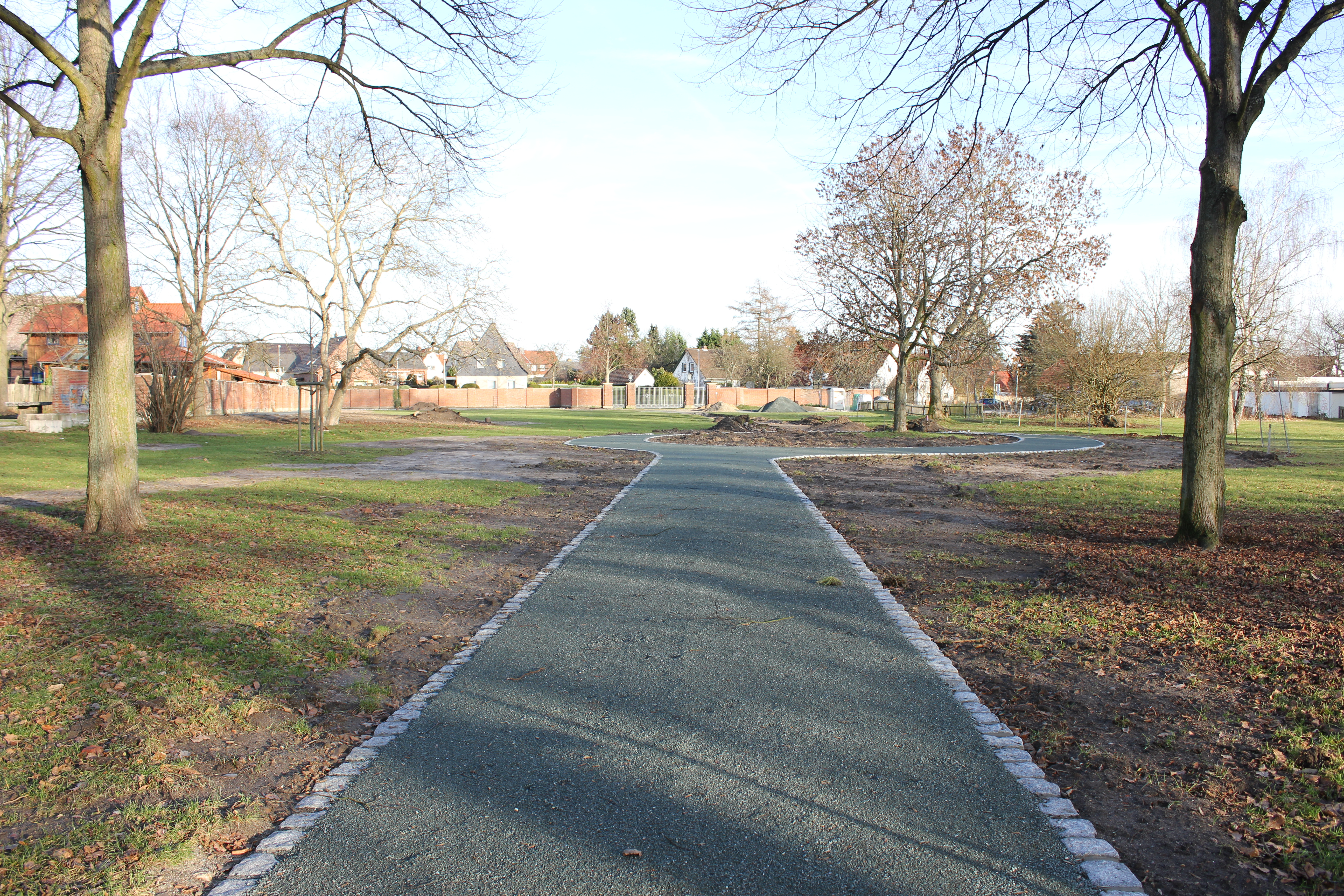 Neu entstandener Weg im Gutspark in Mörse